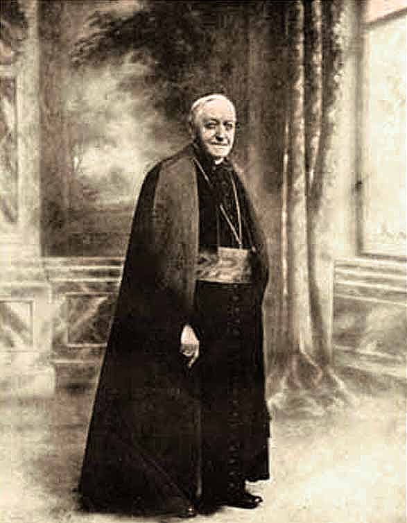 Cardinal Anatole de Cabrières, évêque de Montpellier